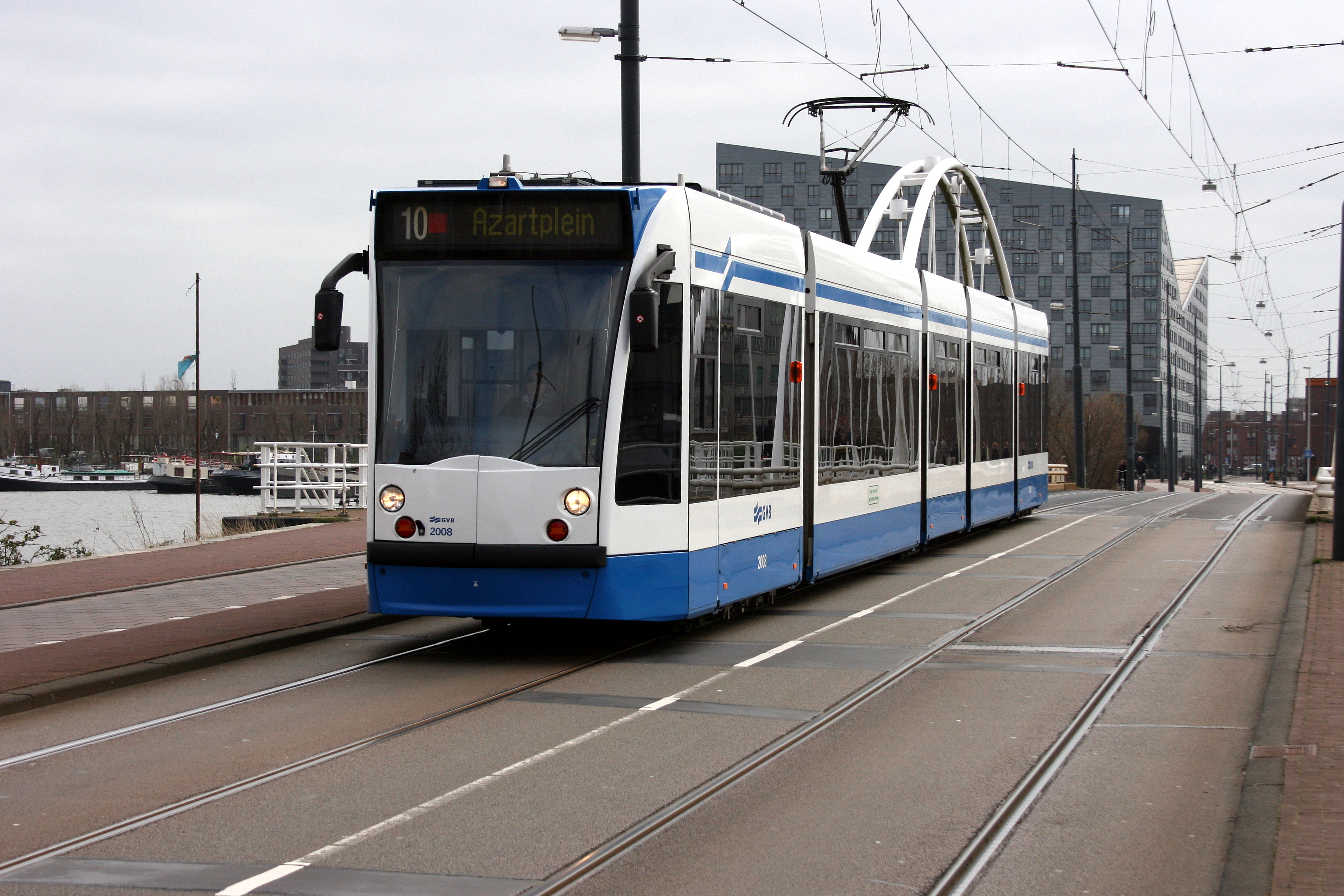 Nadert eindpunt Azartplein over de Verbindingsdam naar het KNSM-Eiland.